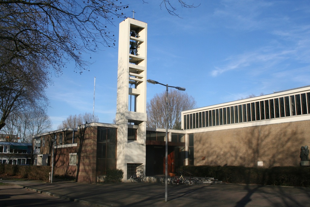 Sint-Lucaskerk (Osdorp), 1964-'65; architecten: Th. Taen en Th. Nix. Foto: Erik Swierstra.